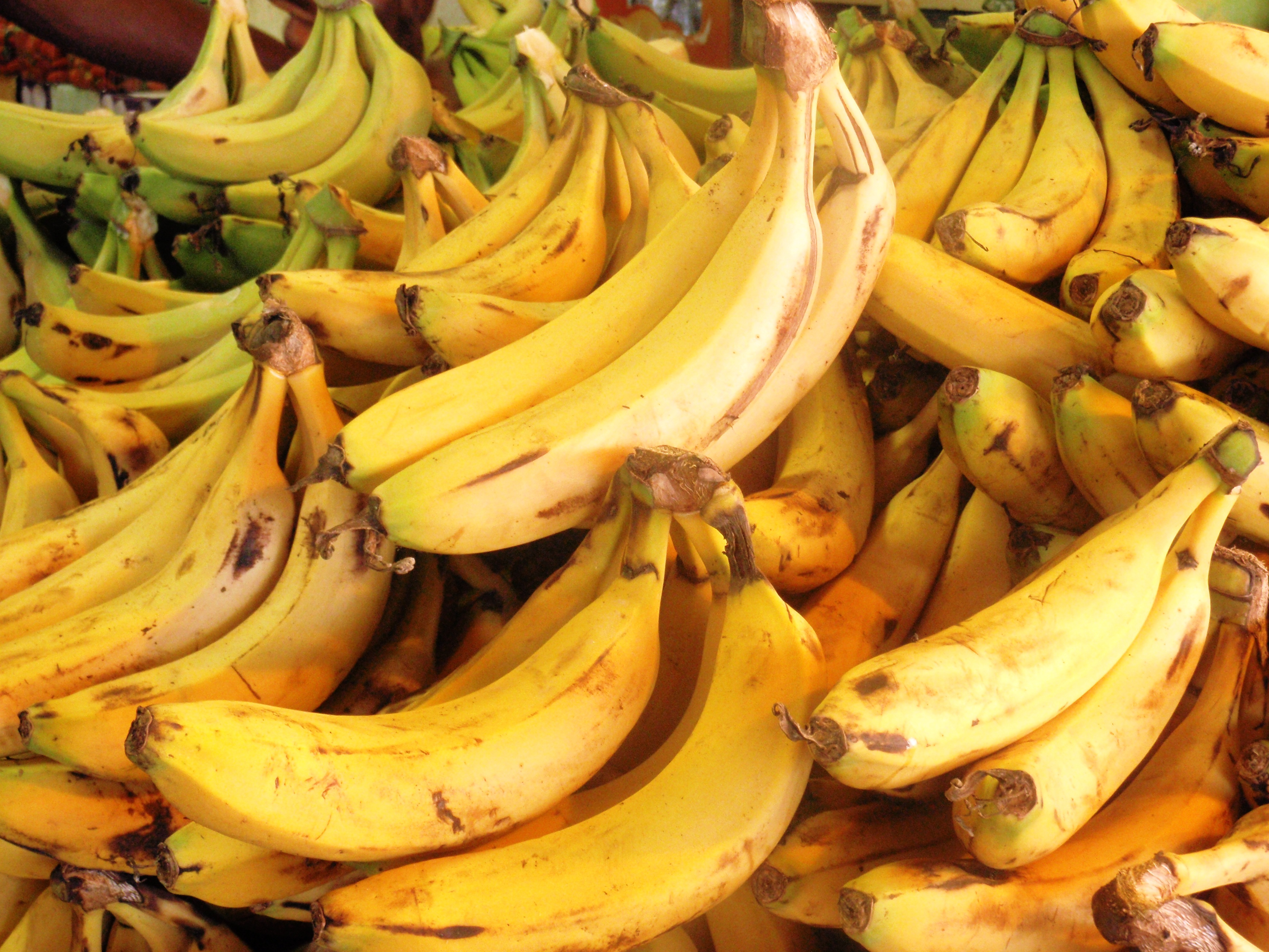 ירקות ופירות בשוק Vegetables and fruit market Bananas